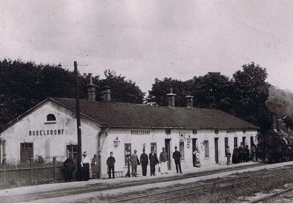 Původní vzhled stanice Rudelsdorf (Rudoltice)